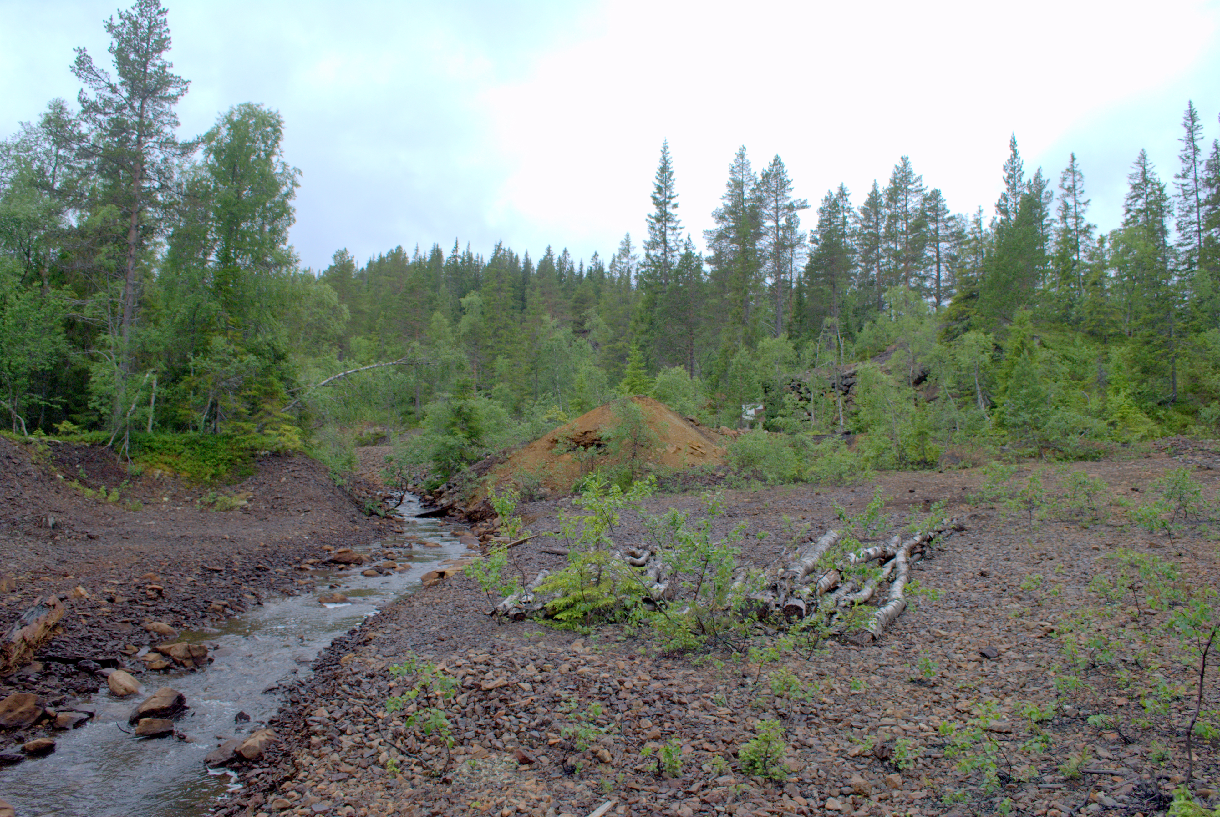 Avfallstipper / veltemasser med forurensede tungmetaller preger miljøet rundt langs Gruvebekken/Maliseterbekken ved Dragset Verk i Meldal kommune i Sør-Trøndelag.